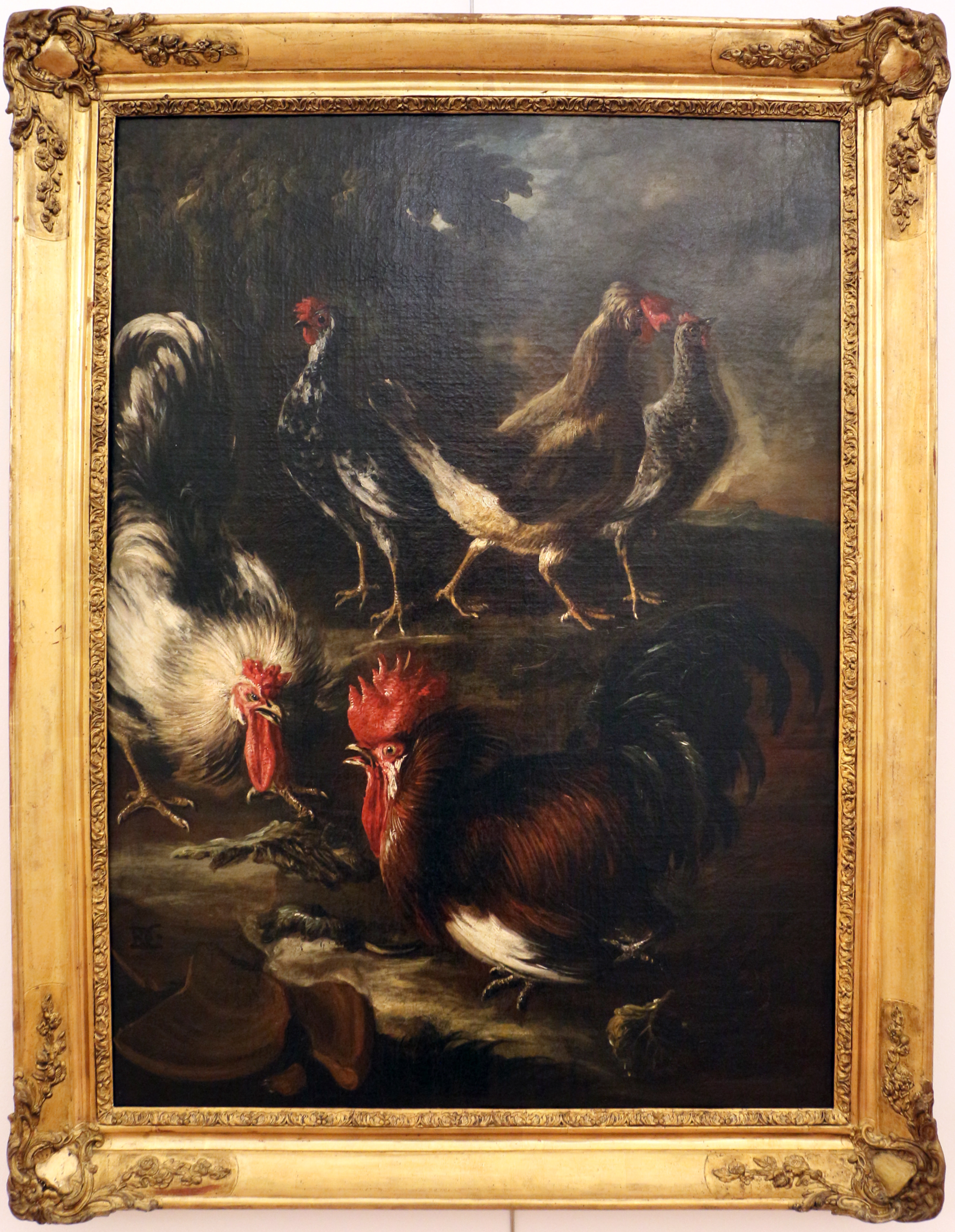 rissa di gallititle QS:P1476,it:"rissa di galli" label QS:Lit,"rissa di galli"